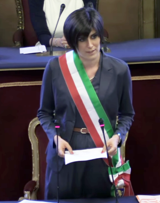 Particolare dell'immagine che riguarda Chiara Appendino nel discorso di insediamento al Comune di Torino. Credo valorizzi meglio la persona.